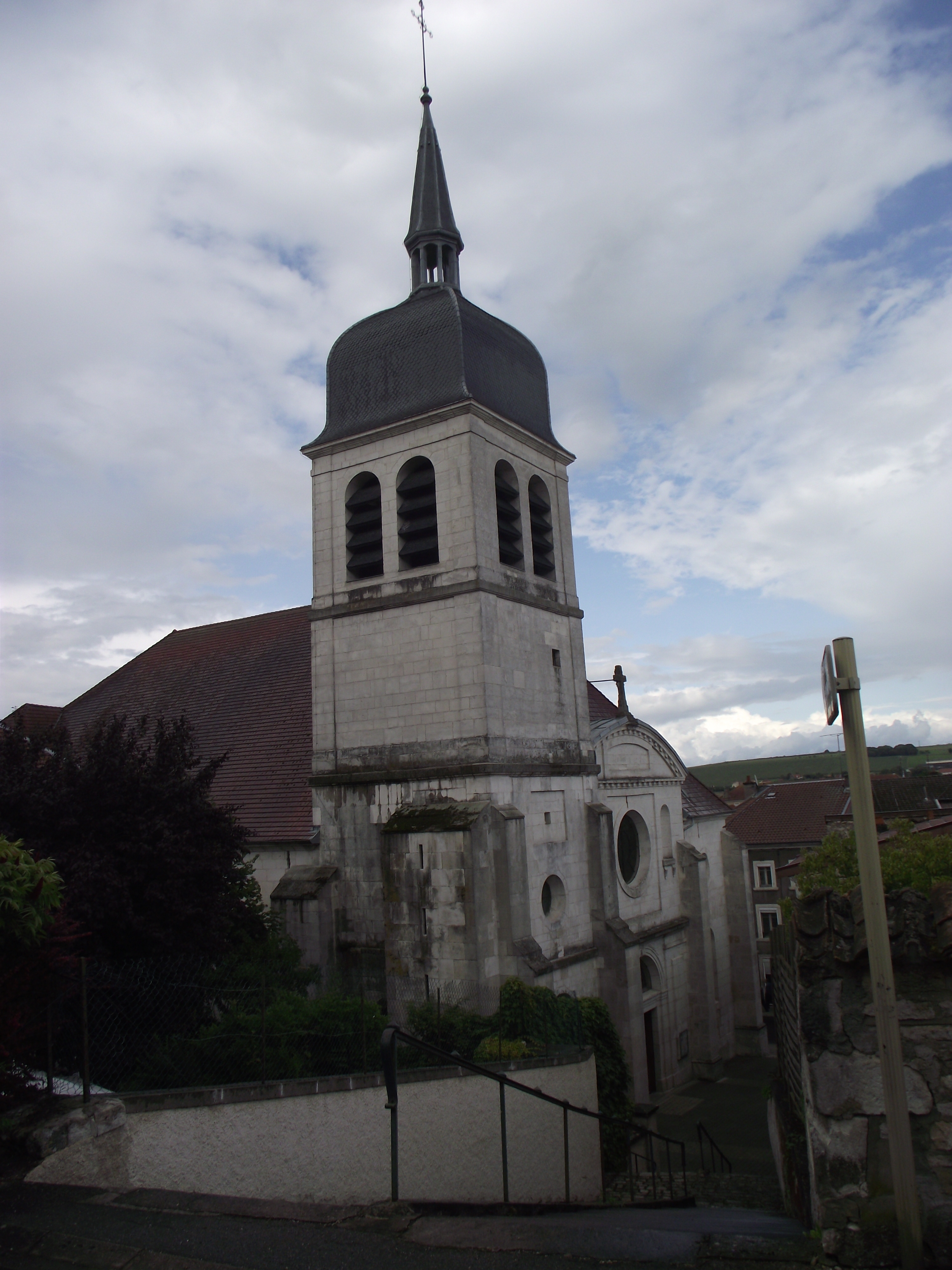 Eglise Saint Laurent à Vaucouleurs (Meuse)